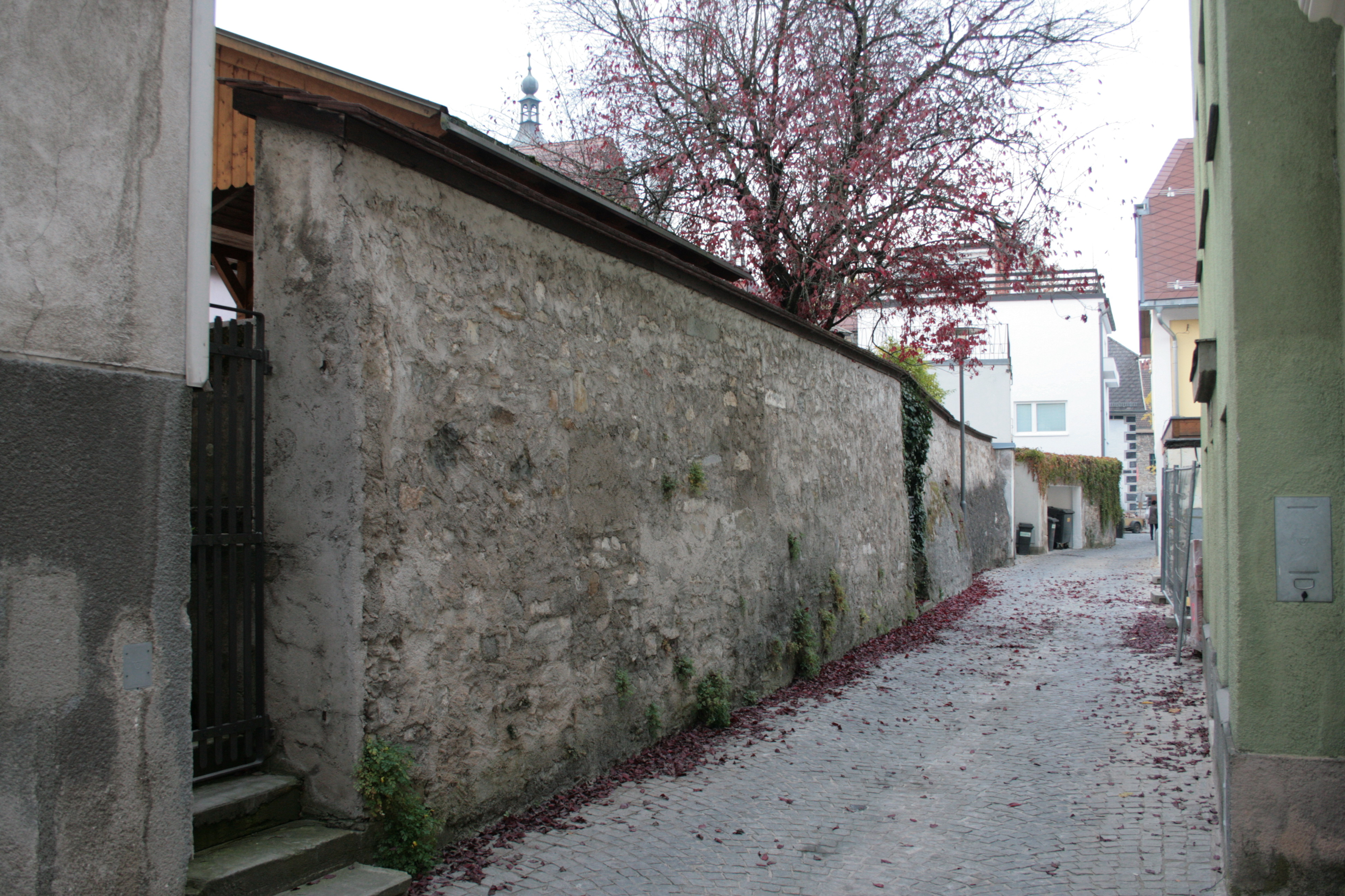 Stadtmauerabschnitt